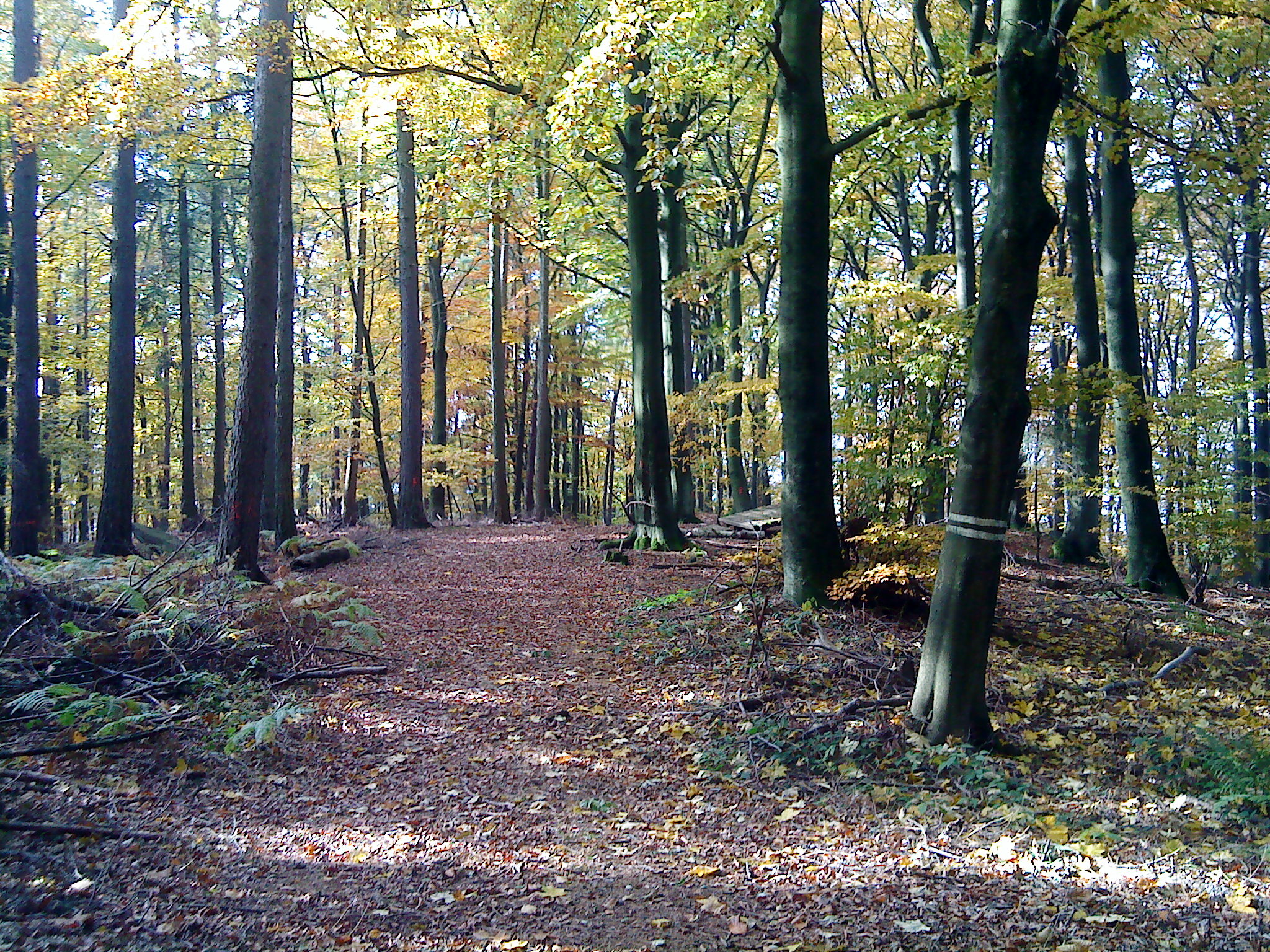 Die Burgstall der Altenburg auf dem Reuschberg bei Schöllkrippen